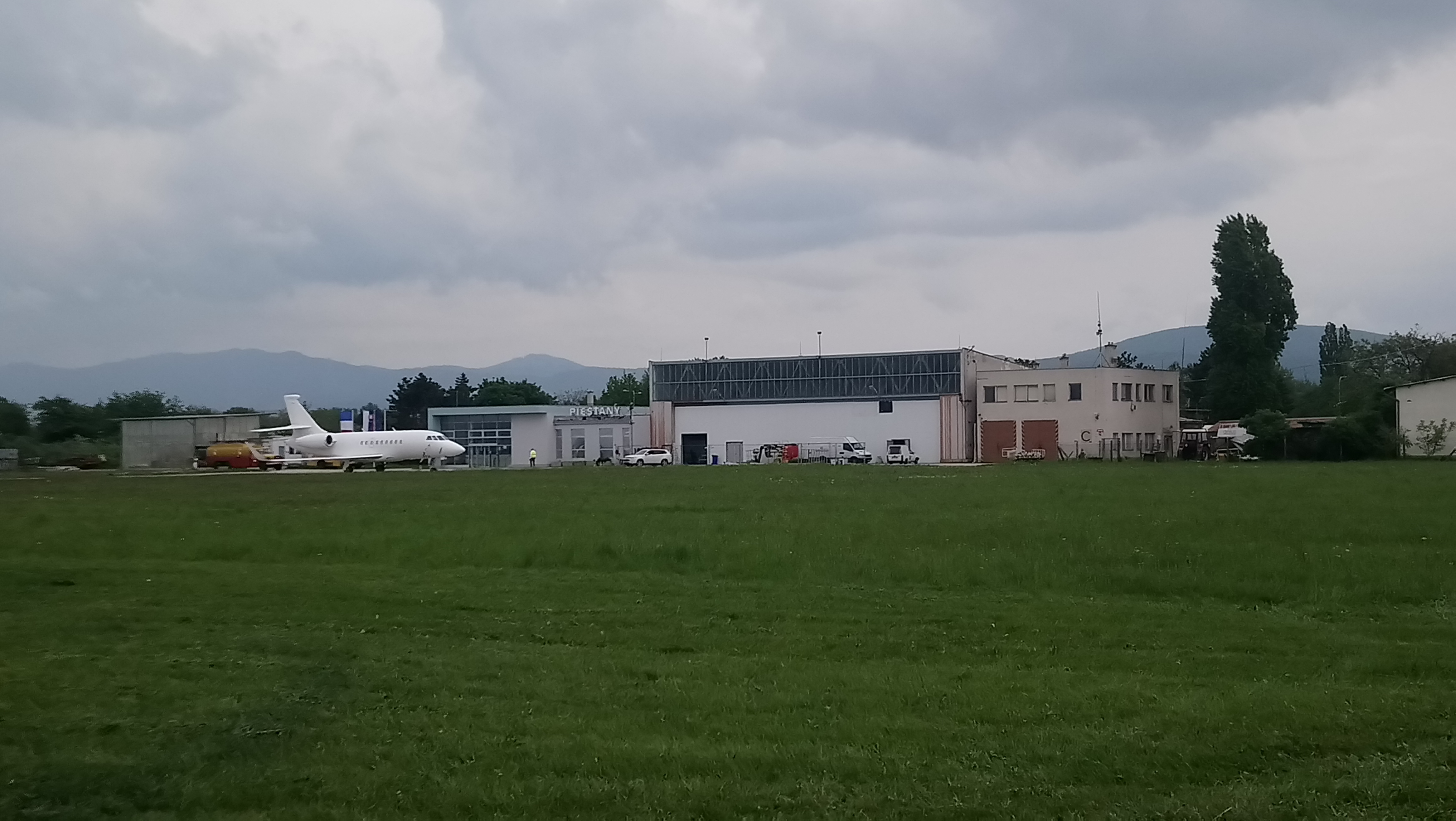 Terminál piešťanského letiska - naľavo odletová časť, napravo príletová časť pri konci jej rekonštrukcie v máji 2019.